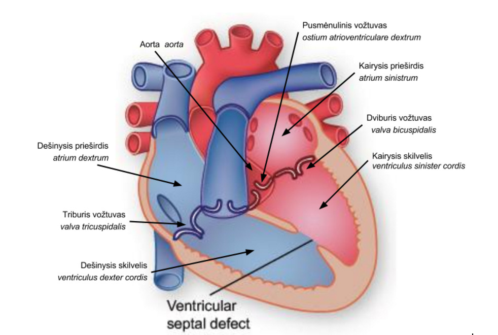 Skilvelių pertvaros defektas ir pagrindinės širdies dalys dvejomis kalbomis (lietuvių-lotynų).